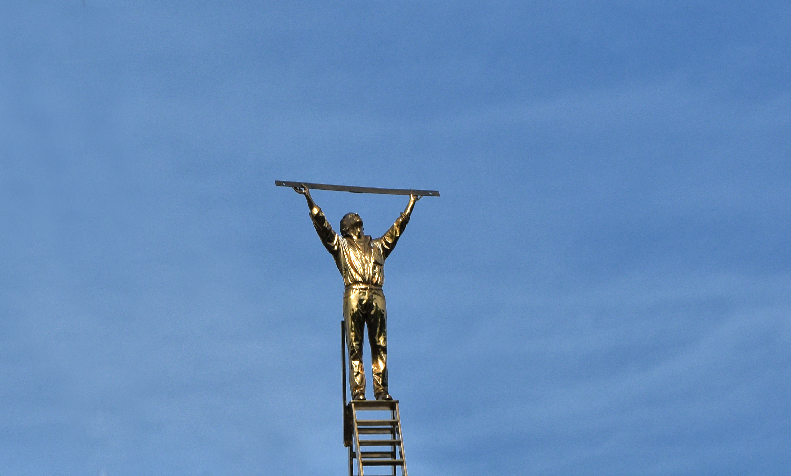 Jan Fabre (1958) De man die de wolken meet - SMAK Gent 2018-07-05 This photo of immovable heritage has been taken in the Flemish Region